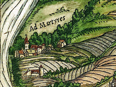 Kloster Sankt Marien in Trier. Ausschnitt aus der Cosmographei / Cosmographia von Sebastian Münster 1550.